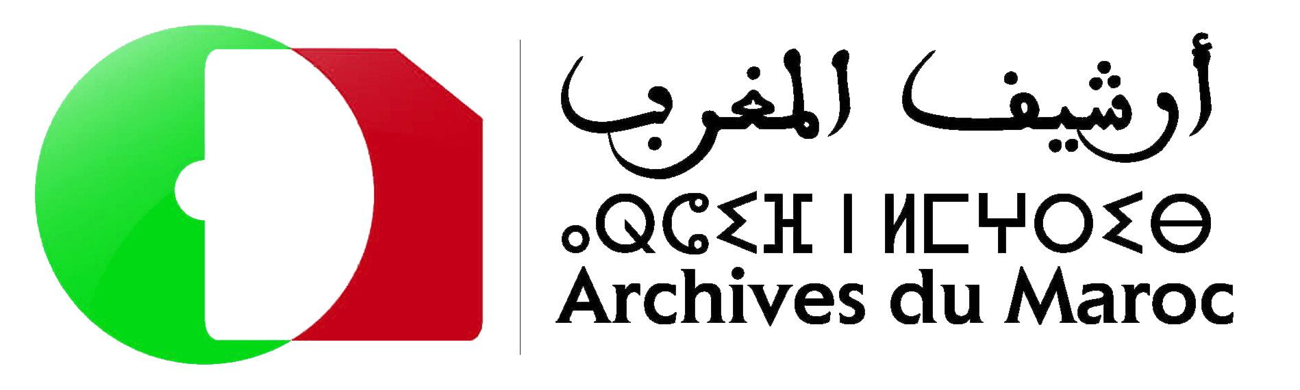 Logo